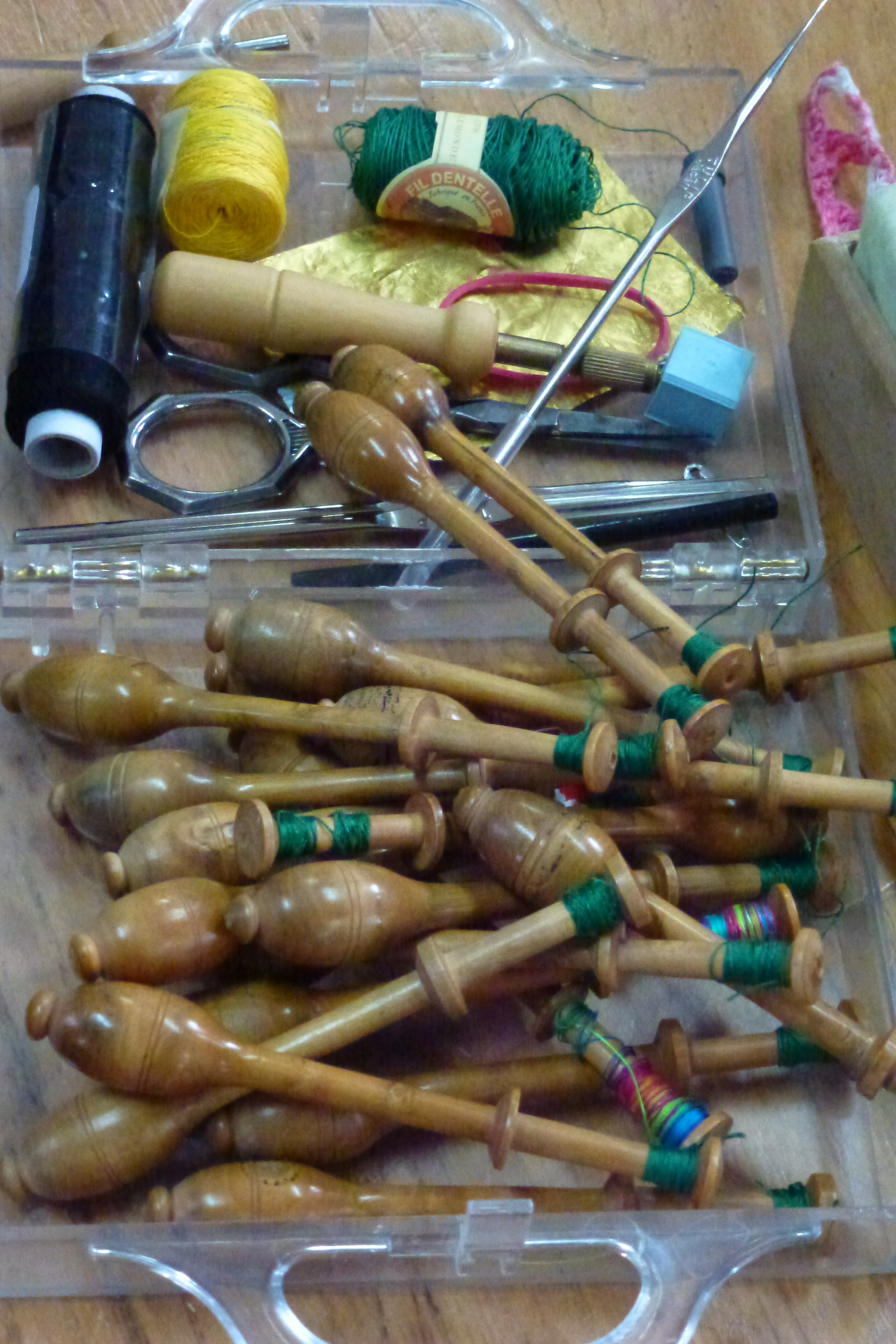 Bailleul (Nord).- Fuseaux sur un carreau flamand dans l'école académique de dentelle Nord.- France.